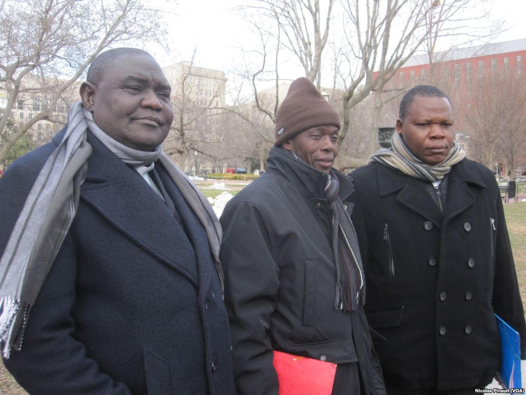 Responsables religieux centrafricains à Washington en mars 2014. Nicolas Guérékoyame Gbangou (pasteur protestant), Omar Kobine Layama (imam) et Dieudonné Nzapalainga (archevêque catholique de Bangui).